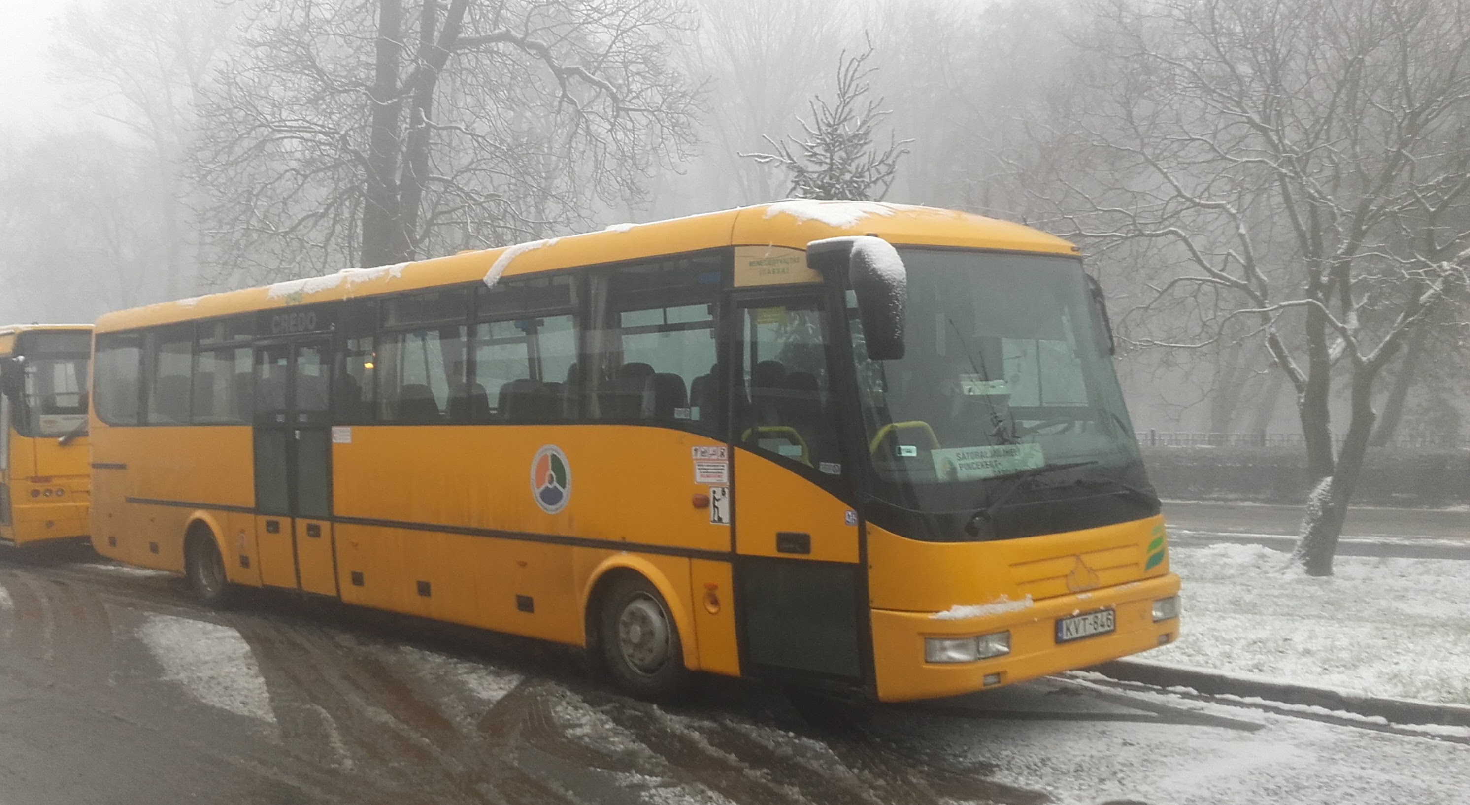 Az ÉMKK KVT-846 rendszámú Credo EC 12 típusú busza Sárospatak, a 3870-es helyközi járaton.